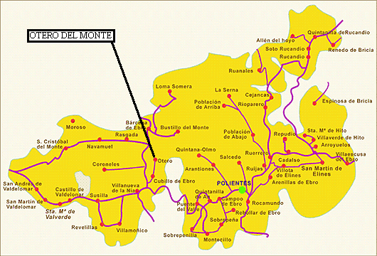 Mapa del Valle de Valderredible. Localización de Otero del Monte